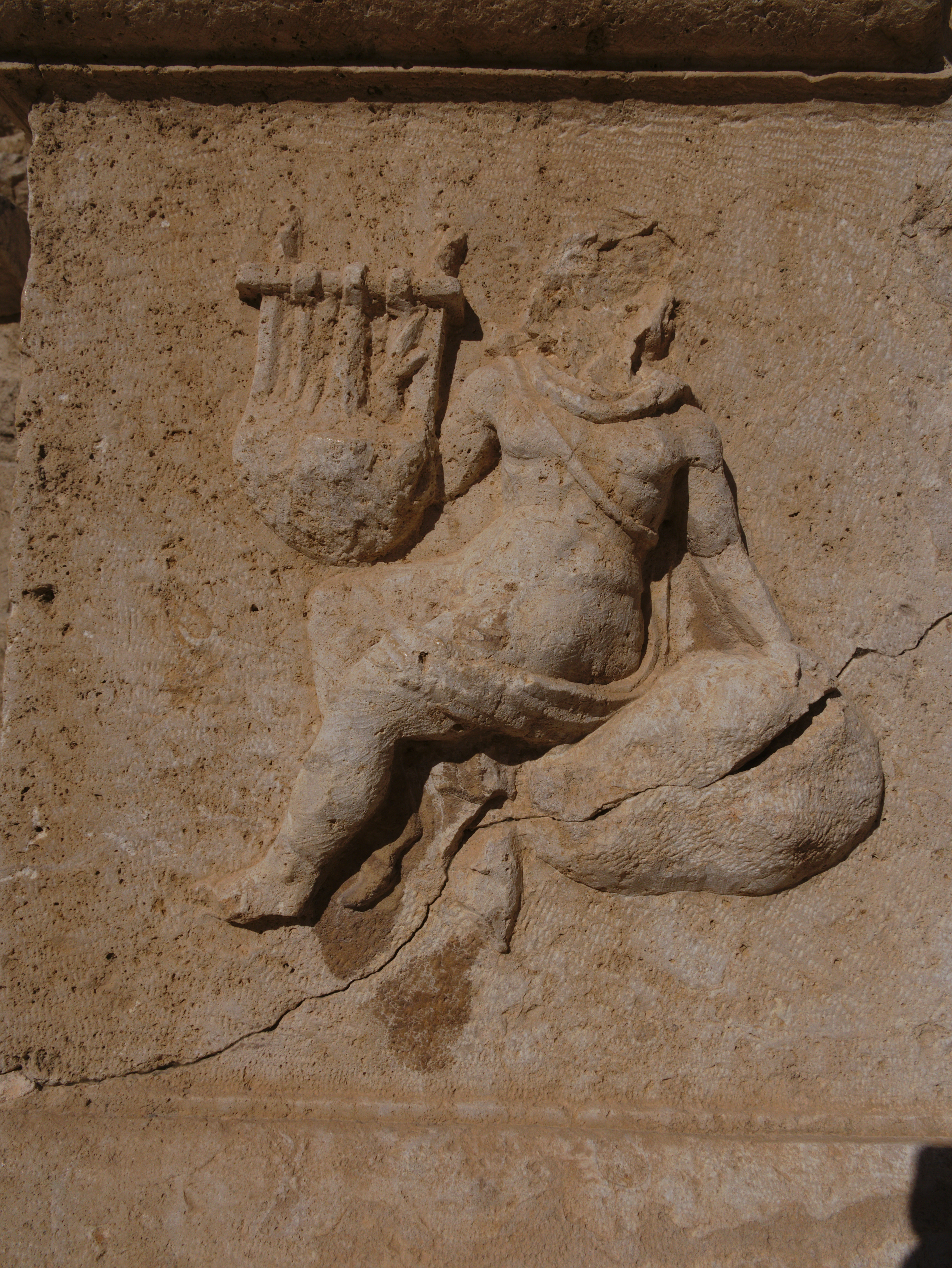 Sculpture